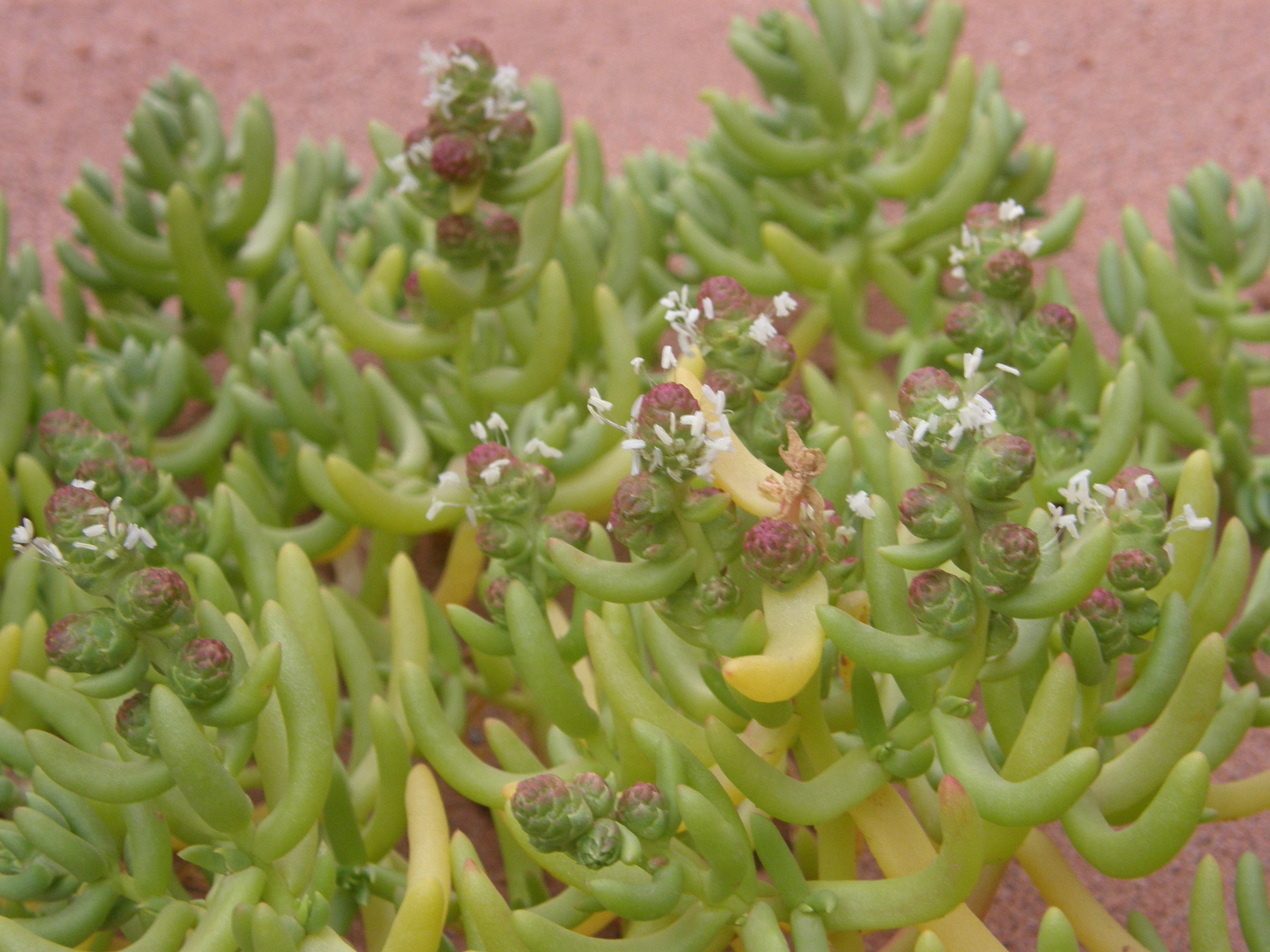 Halophytum ameghinoi- Verdolaga